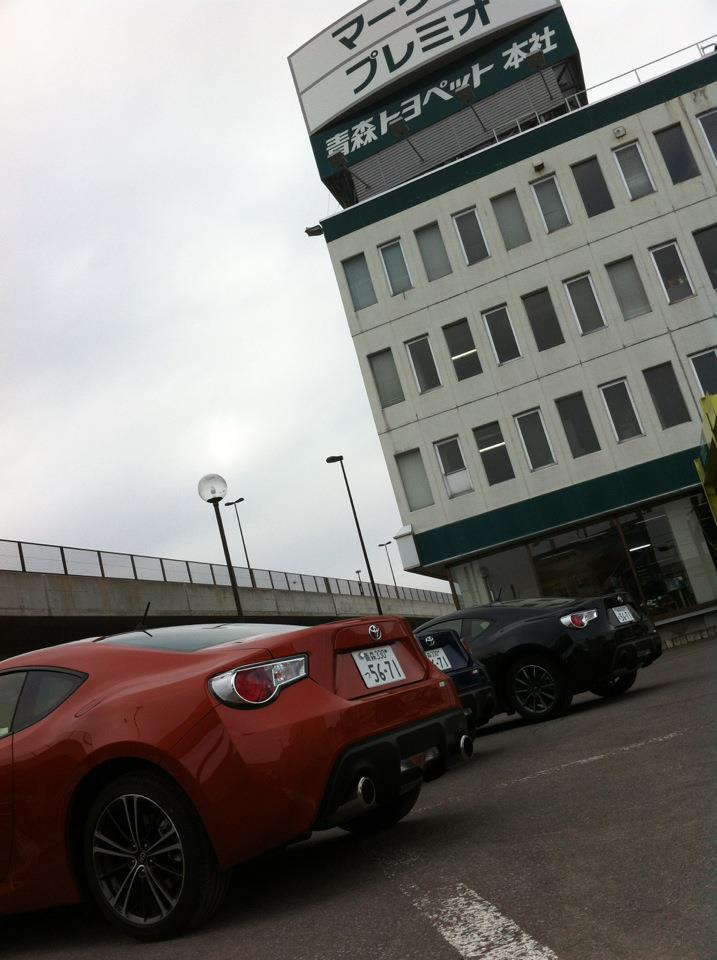 青森トヨペット本社